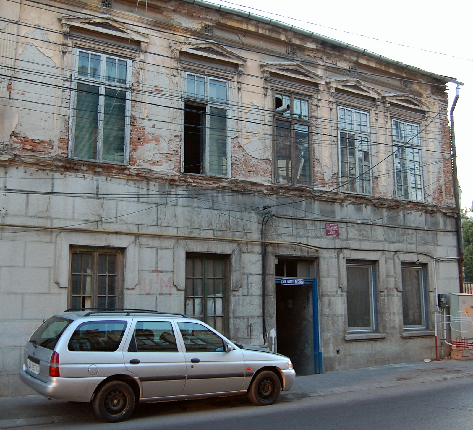 Str. Matei Basarab 6